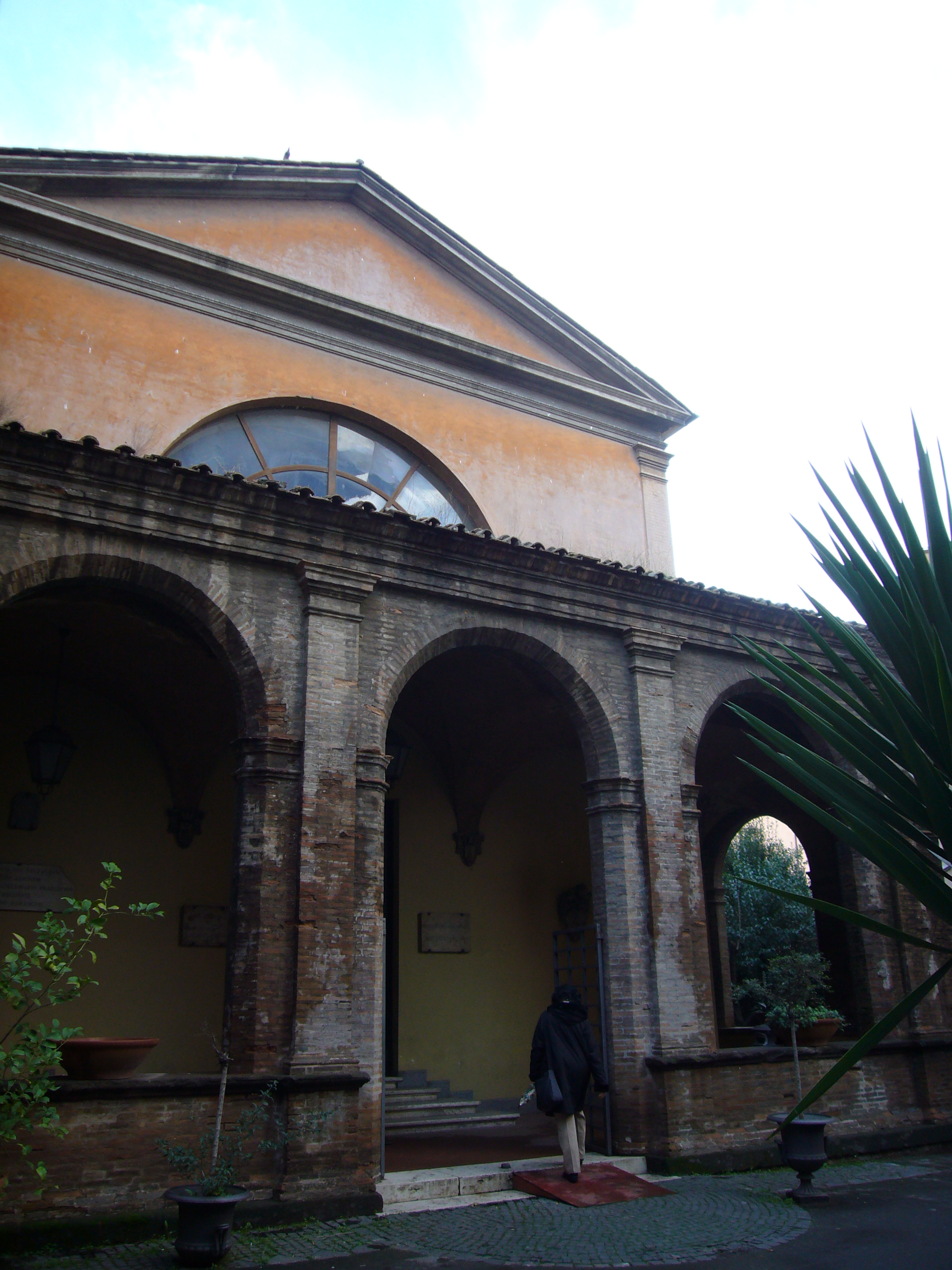 Roma, Arcispedale S. Spirito in Sassia, Museo storico nazionale dell'arte sanitaria: portico d'ingresso verso il lungotevere in Sassia